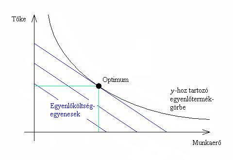 Vállalati költségminimalizálás a mikroökonómiai termeléselmélet modelljében